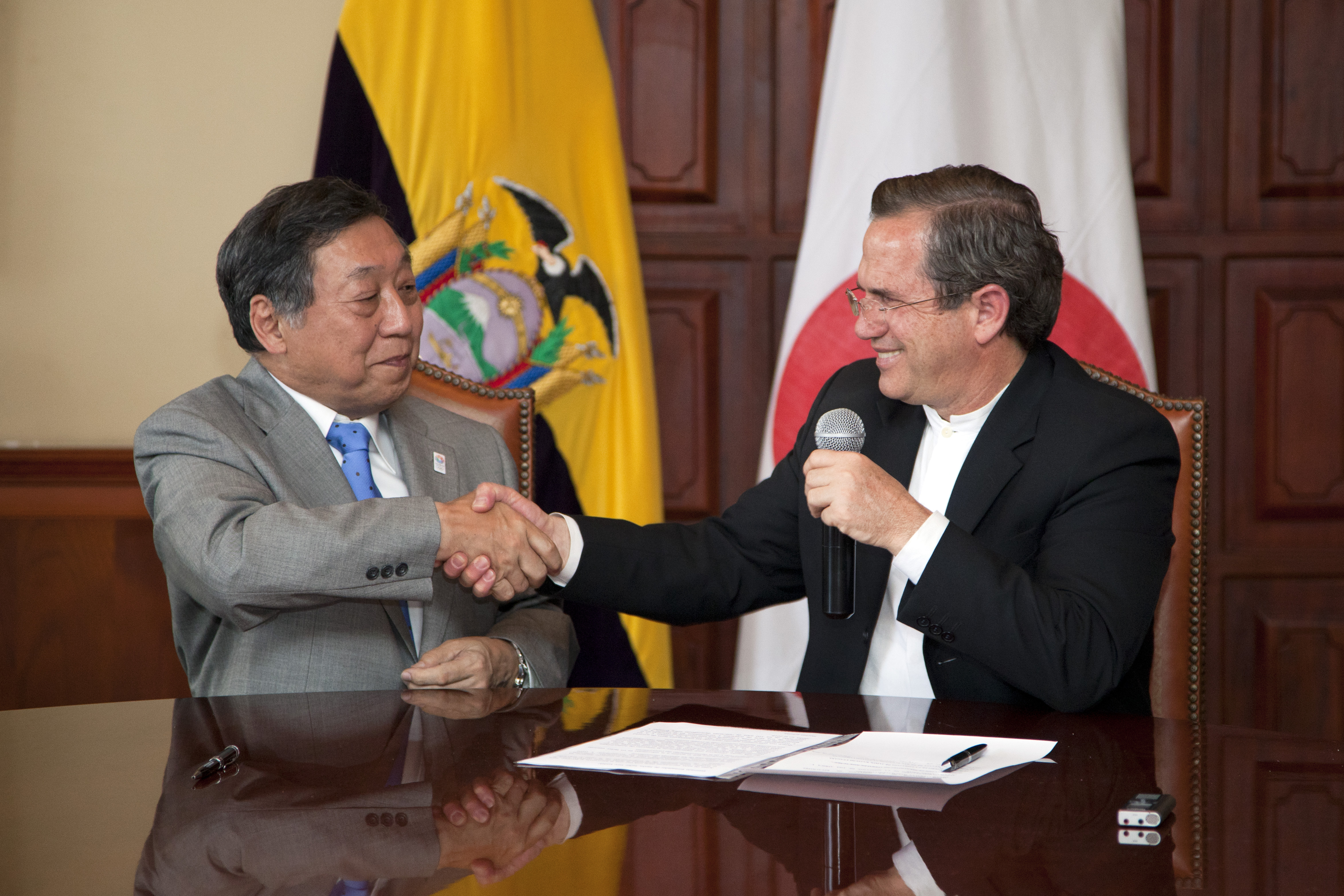 Quito (Ecuador), 10 de abril de 2013. El Canciller Ricardo Patiño y el Embajador de Japón, Toru Kodaki, suscribieron el Acuerdo por canje de notas para donación japonesa de audiovisuales. El representante de RTV Ecuador, Santiago Cordobés, y el representante de la Agencia de Cooperación Internacional de Japón (JICA), Hirofumi Matsuyama, también suscribieron el Acuerdo. Foto: Fernanda LeMarie - Cancillería del Ecuador.